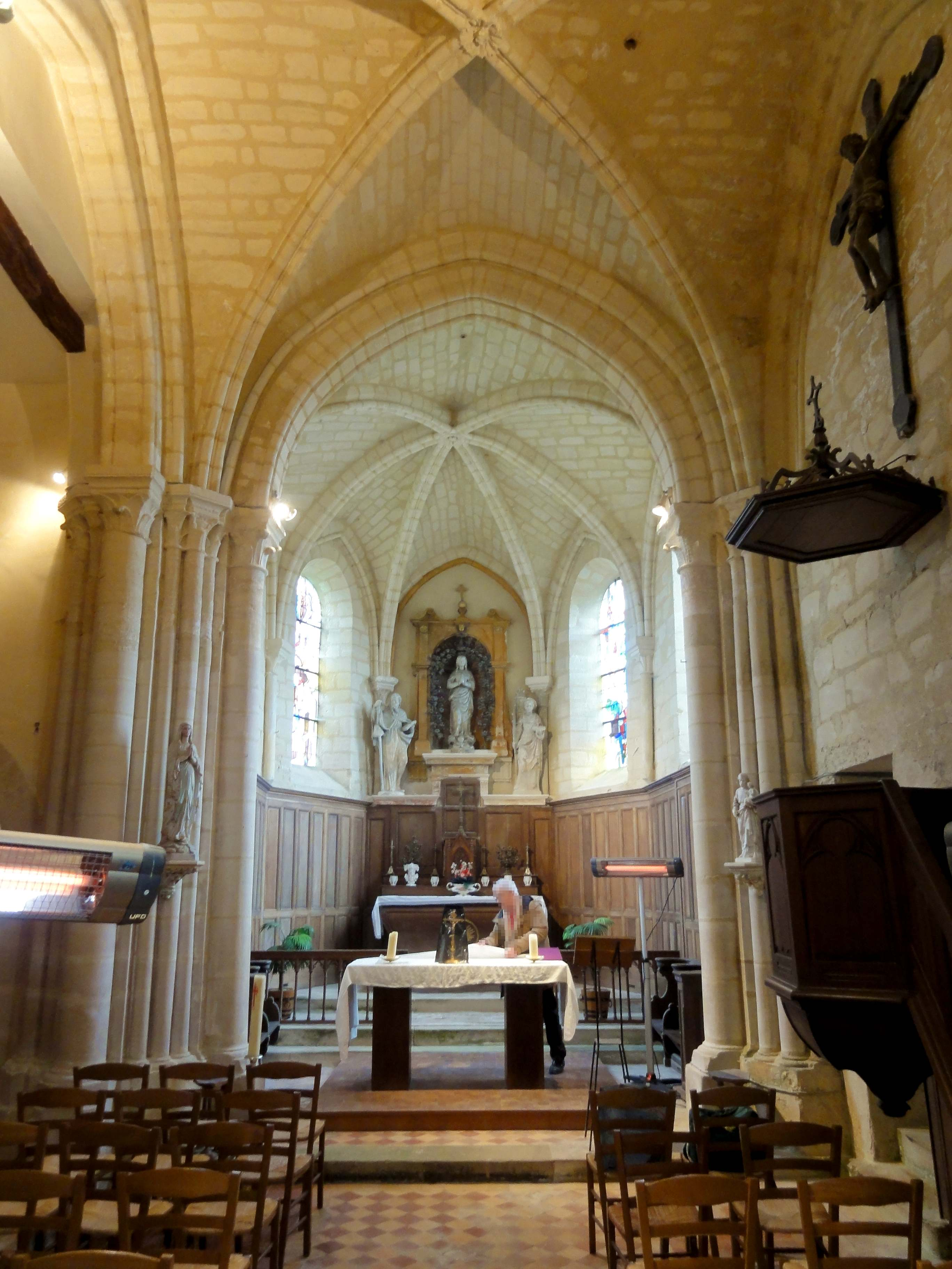 Intérieur de l'église - voir titre.